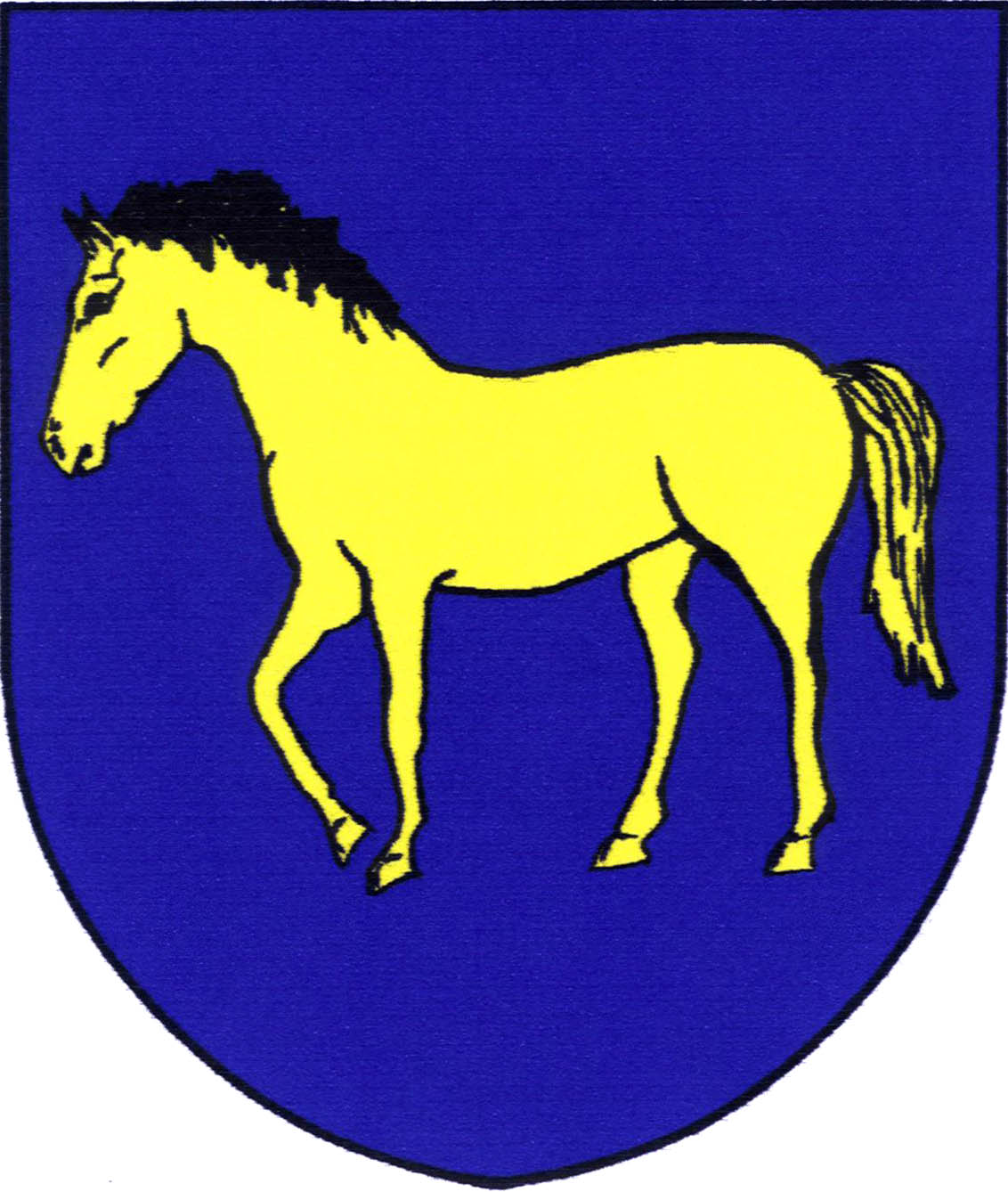 Znak obce Borač